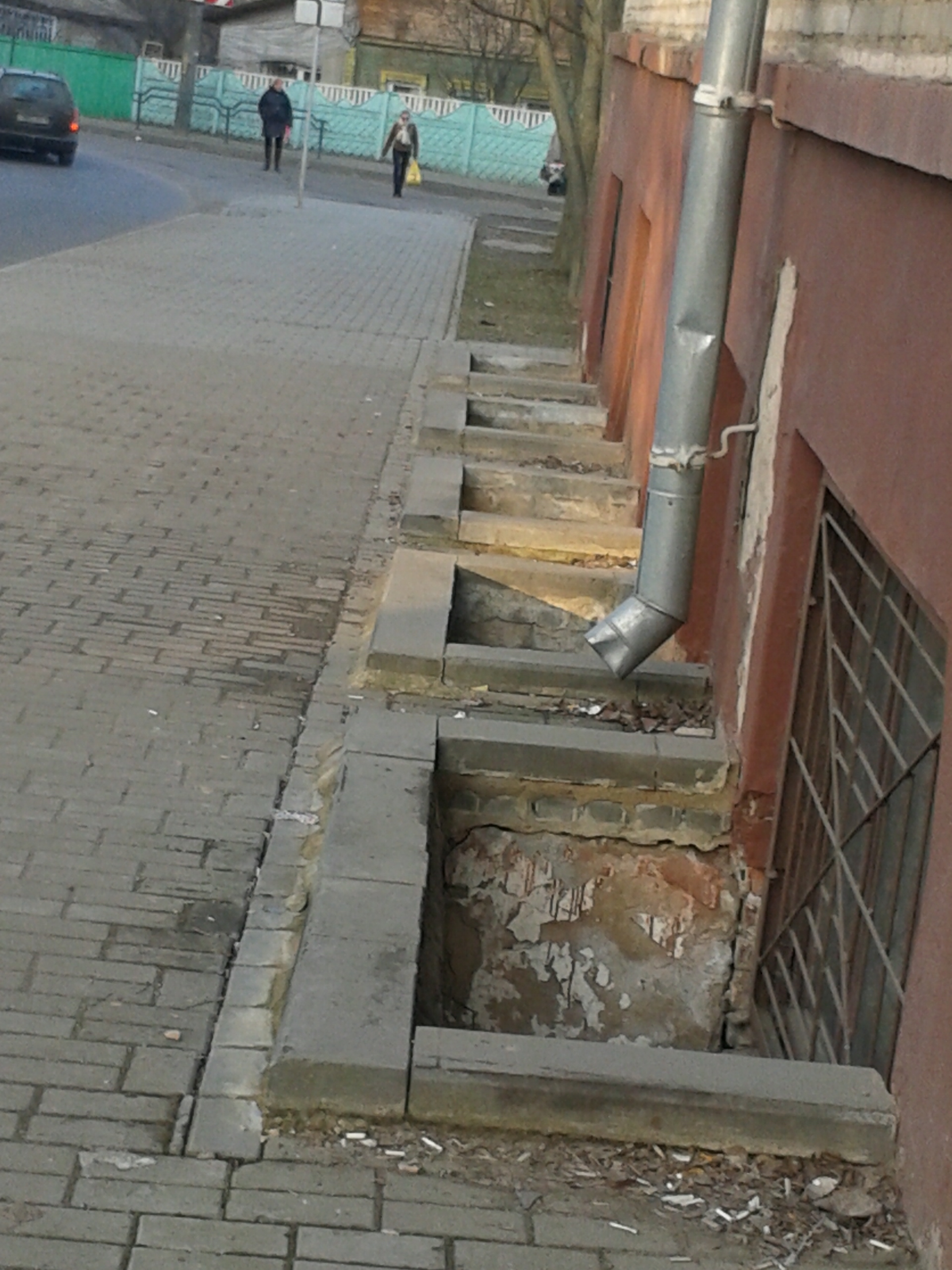 Приямки в городе Могилёв, РБ